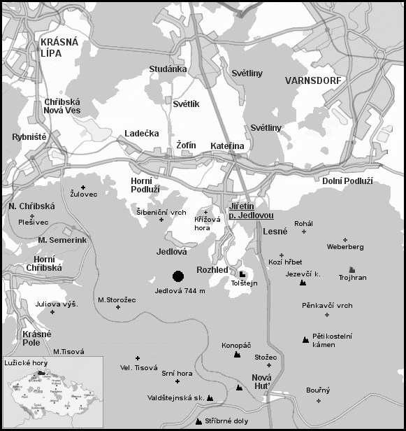 Jedlová 774m Lužické hory